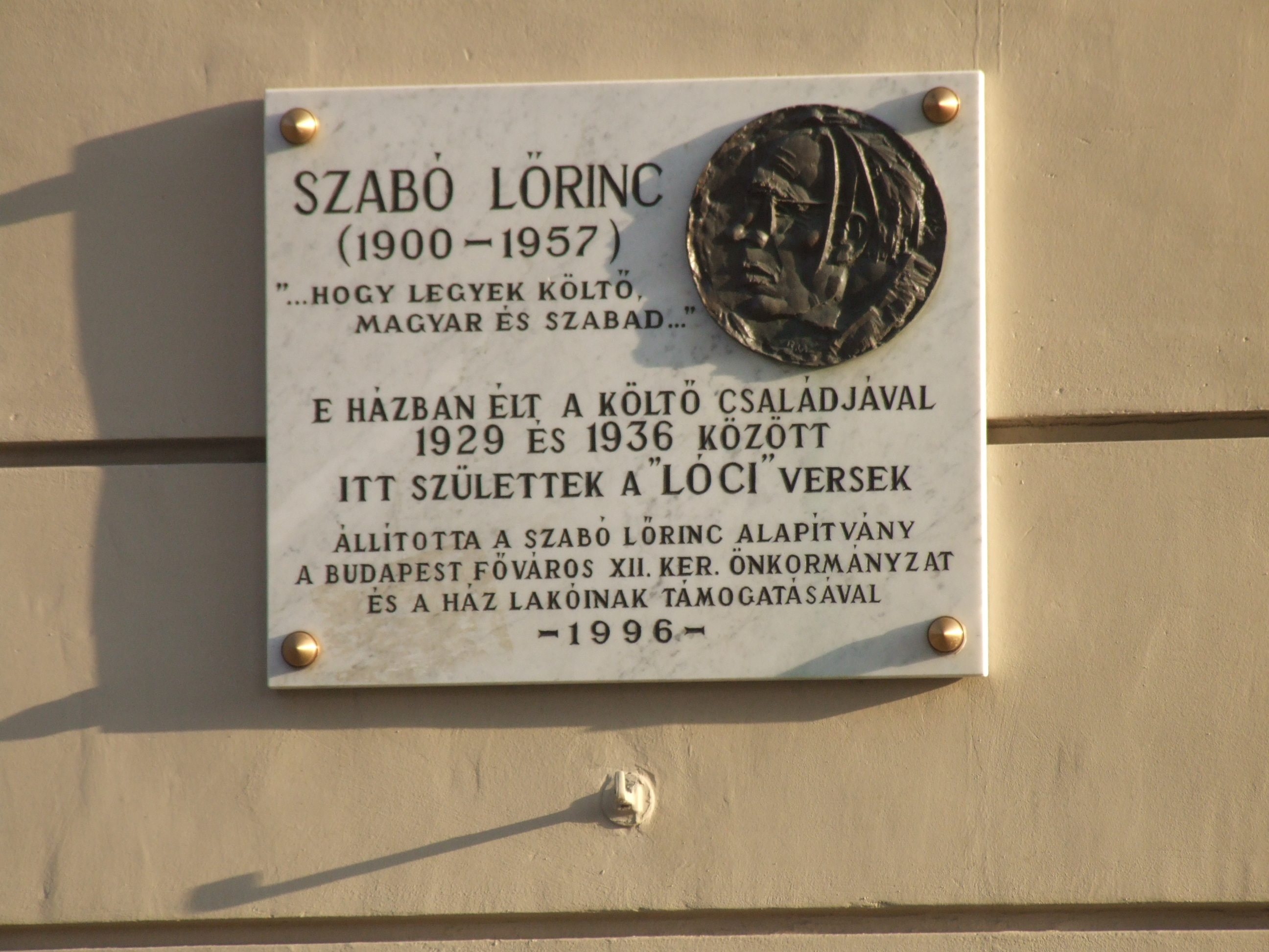 Szabó Lőrinc-emléktábla. Budapest, XII. kerület, Németvölgyi út 16.